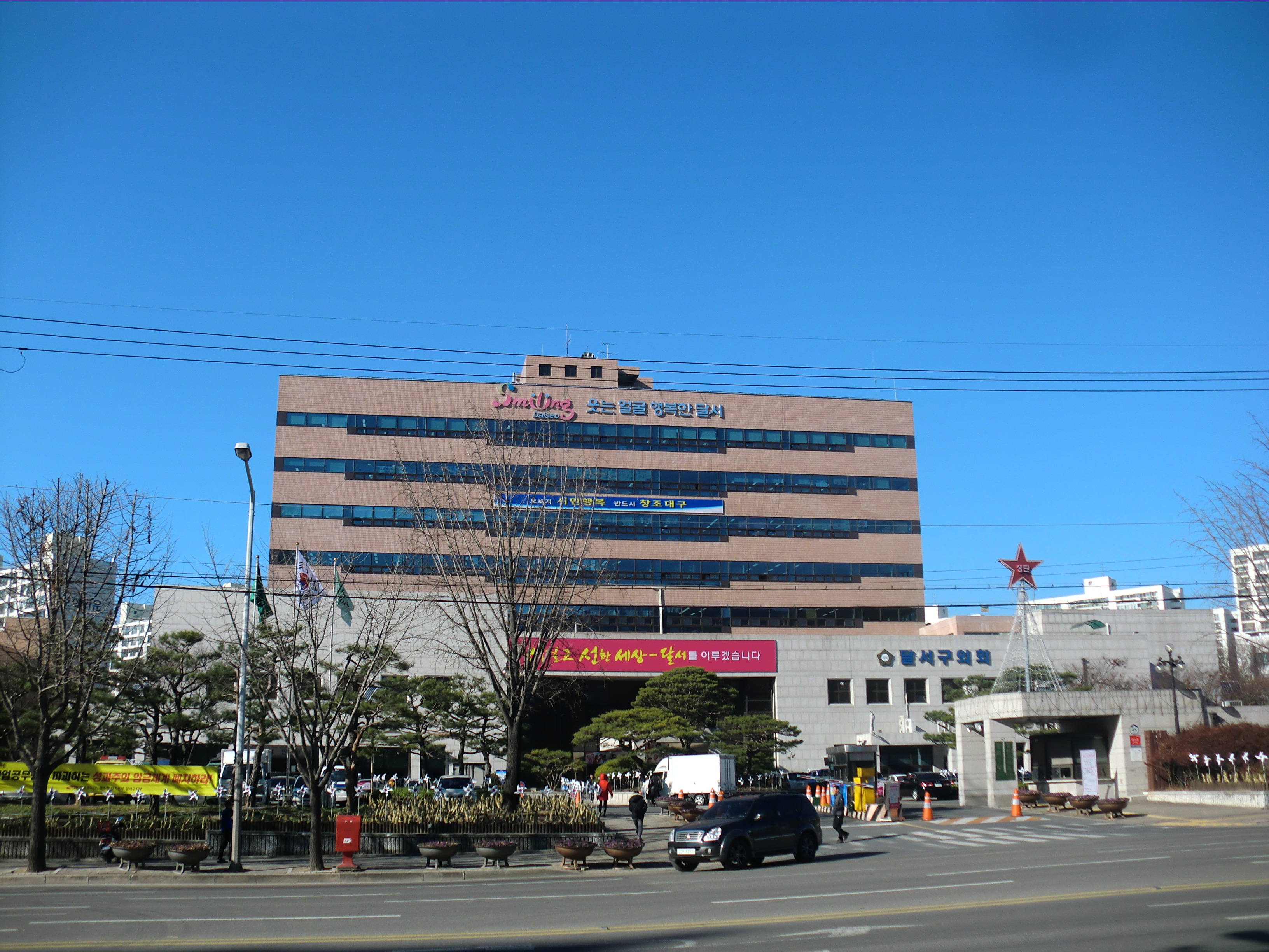 대구광역시 달서구에 있는 달서구청